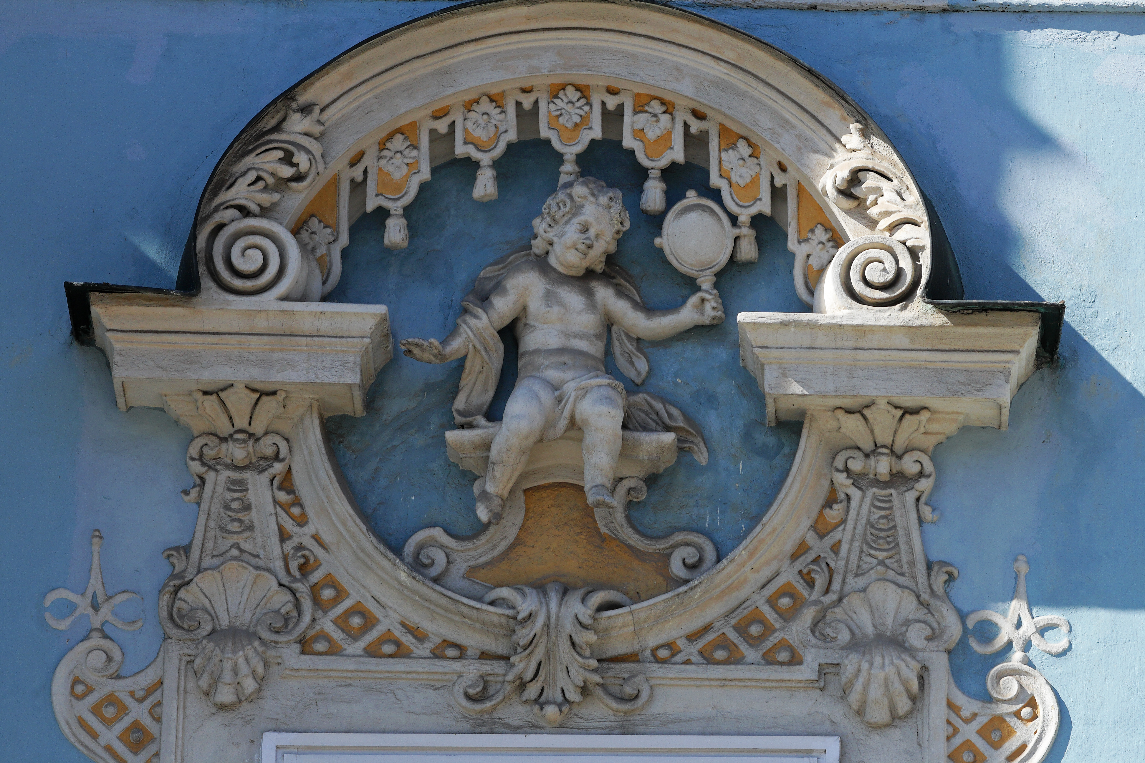 An der Fassade des Steyrer Sternhauses befinden sich über den Fenstern des zweiten Stockes Allegorien der fünf Sinne. Hier das vierte Feld von links mit dem Thema „Gesicht“ (Sehen)